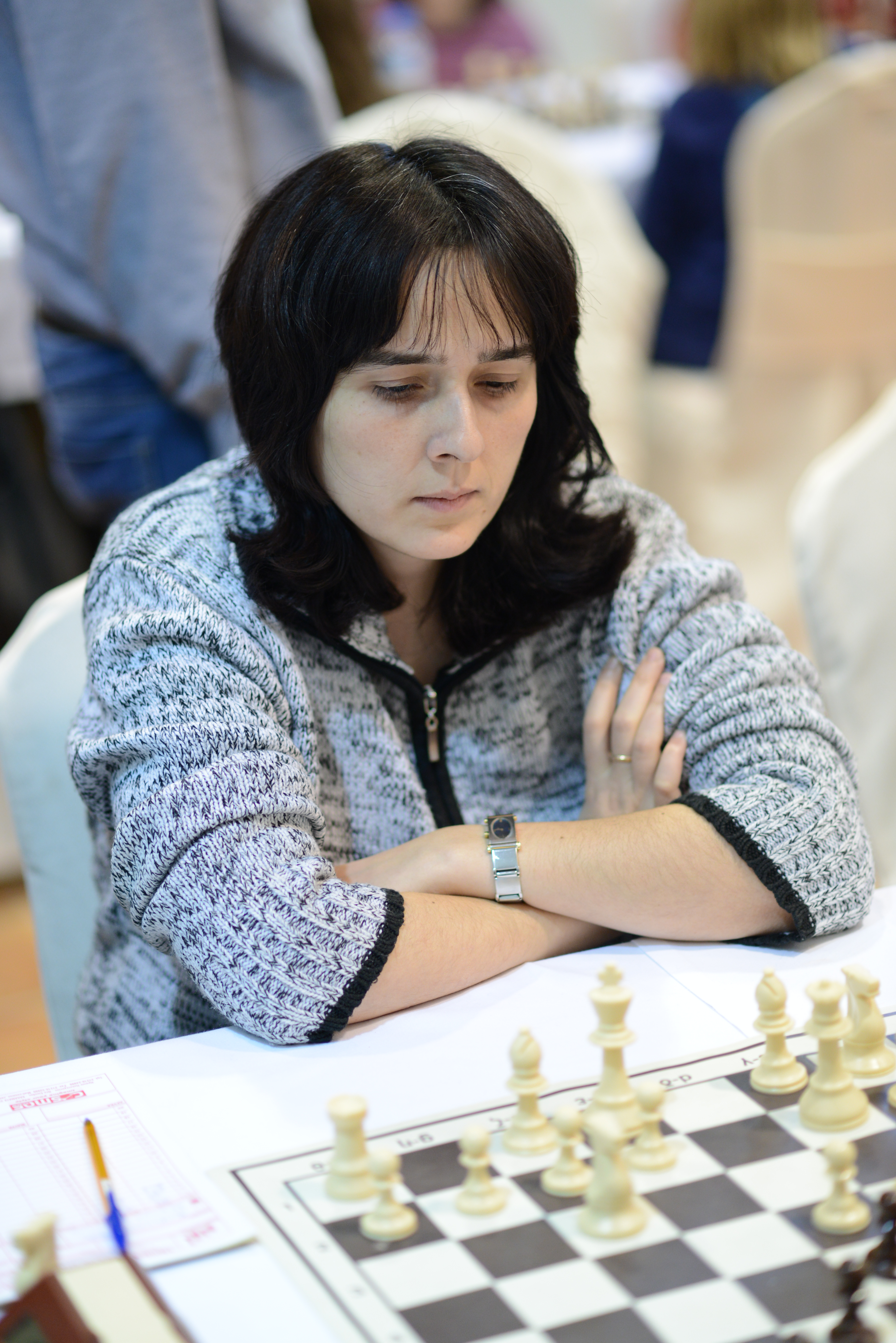 Svetla Yordanova